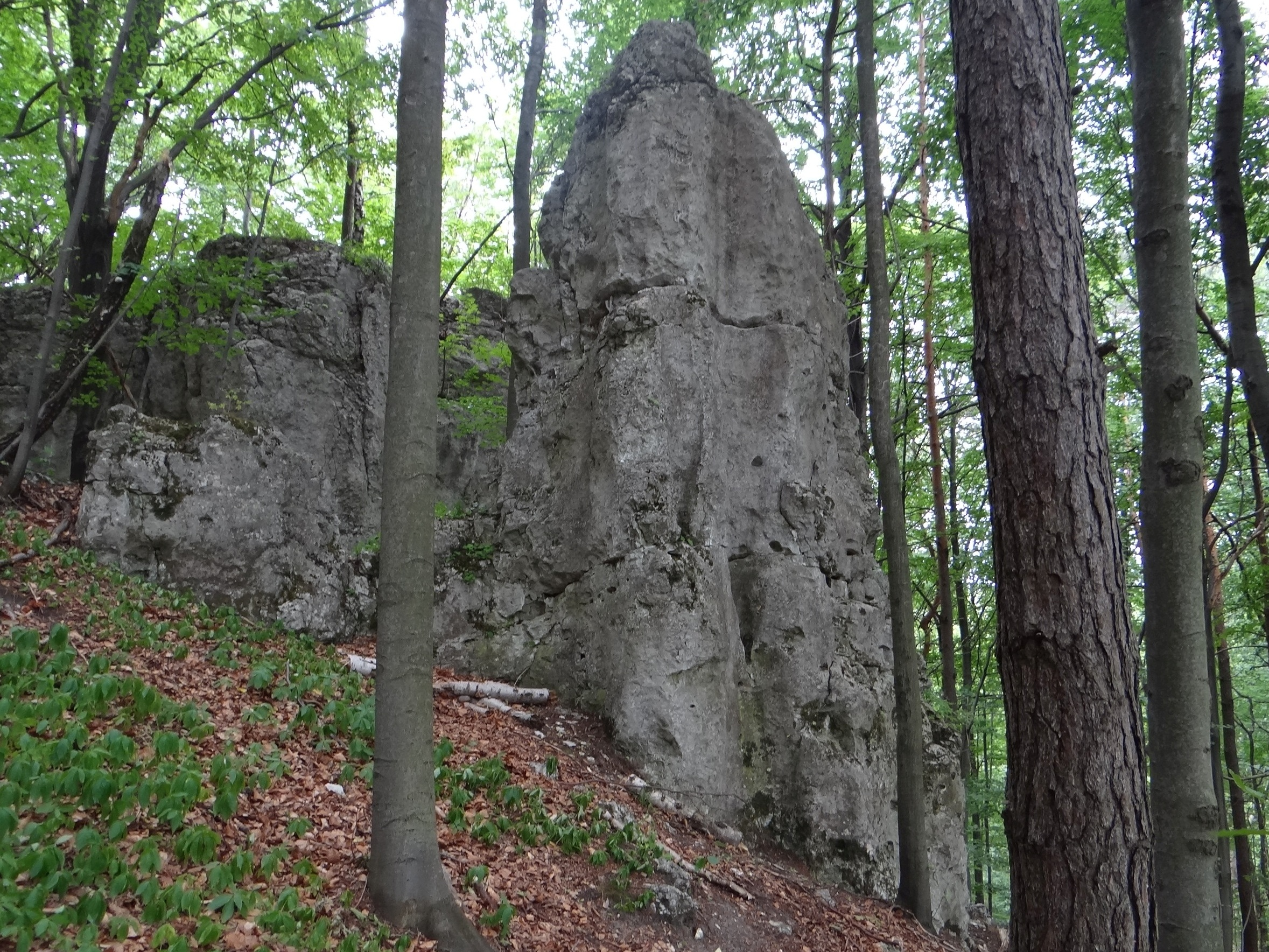 Skała Gips VII na wzgórzu Łężec między Morskiem i Podlesicami